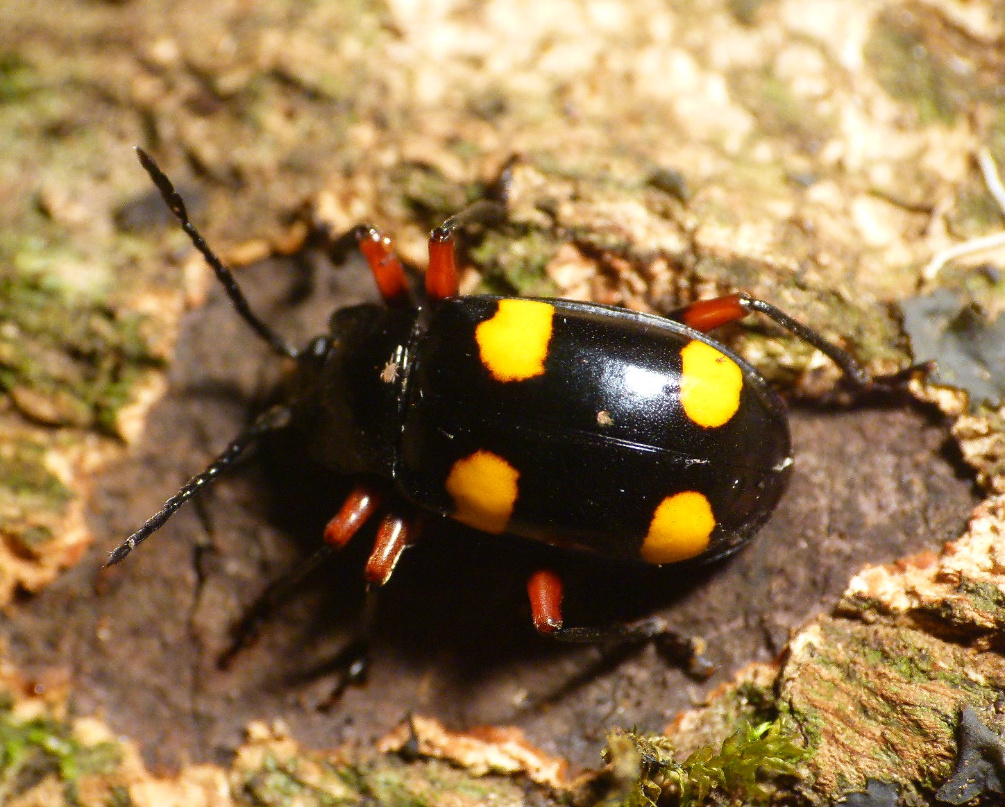 Endomychidae. Coleoptera. Wayanad, India.